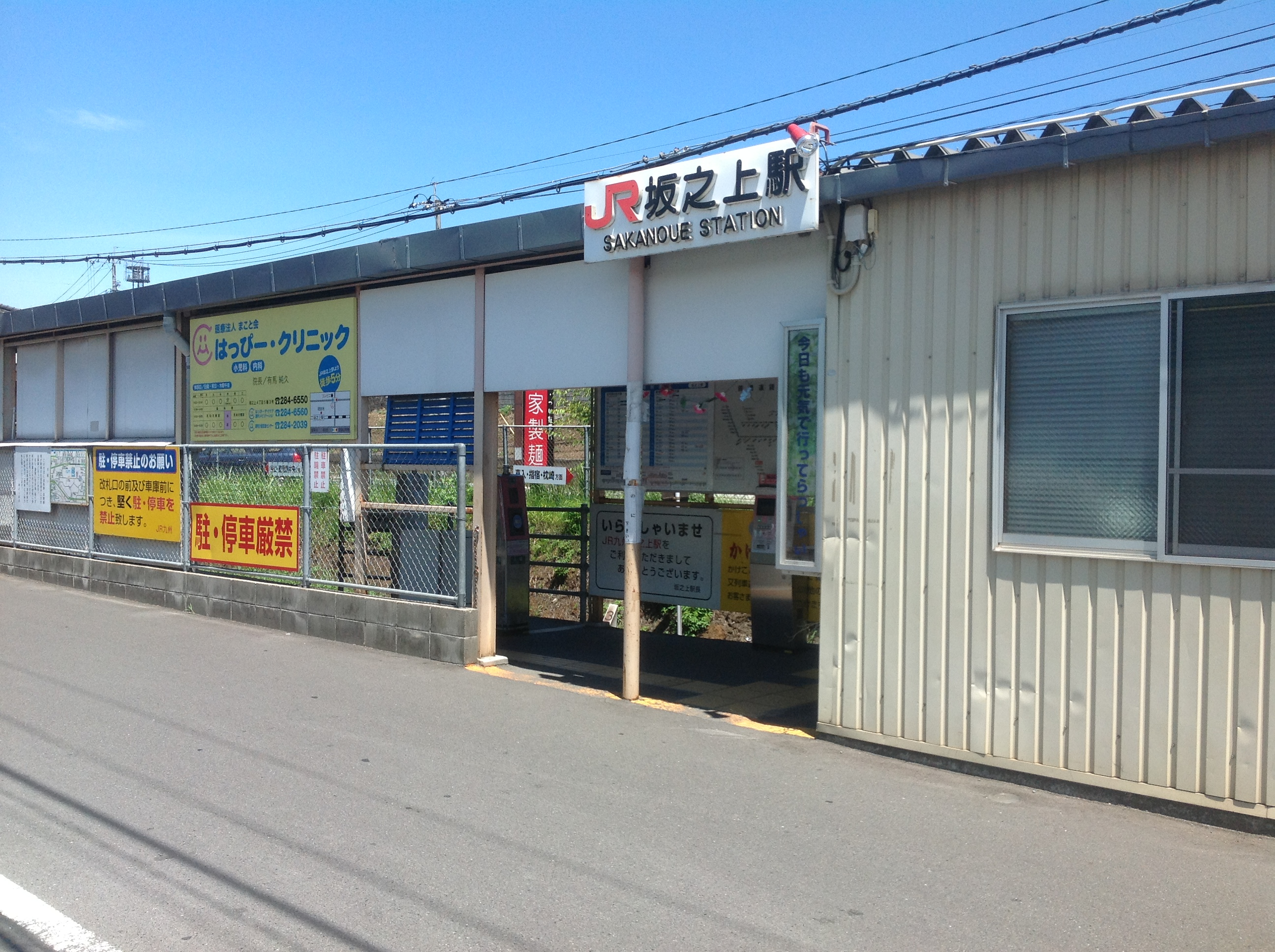 坂之上駅入り口